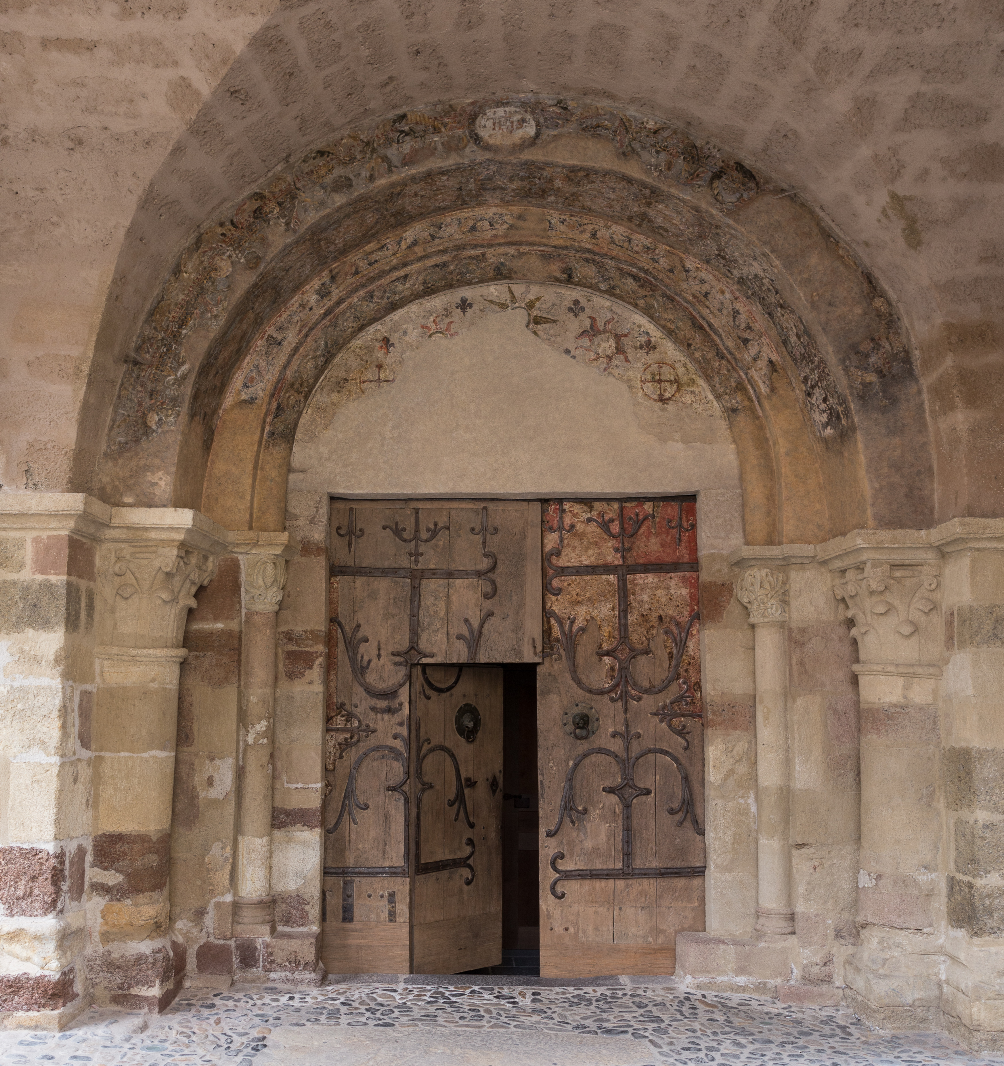 Basilique Saint-Julien de Brioude : portail sud. .